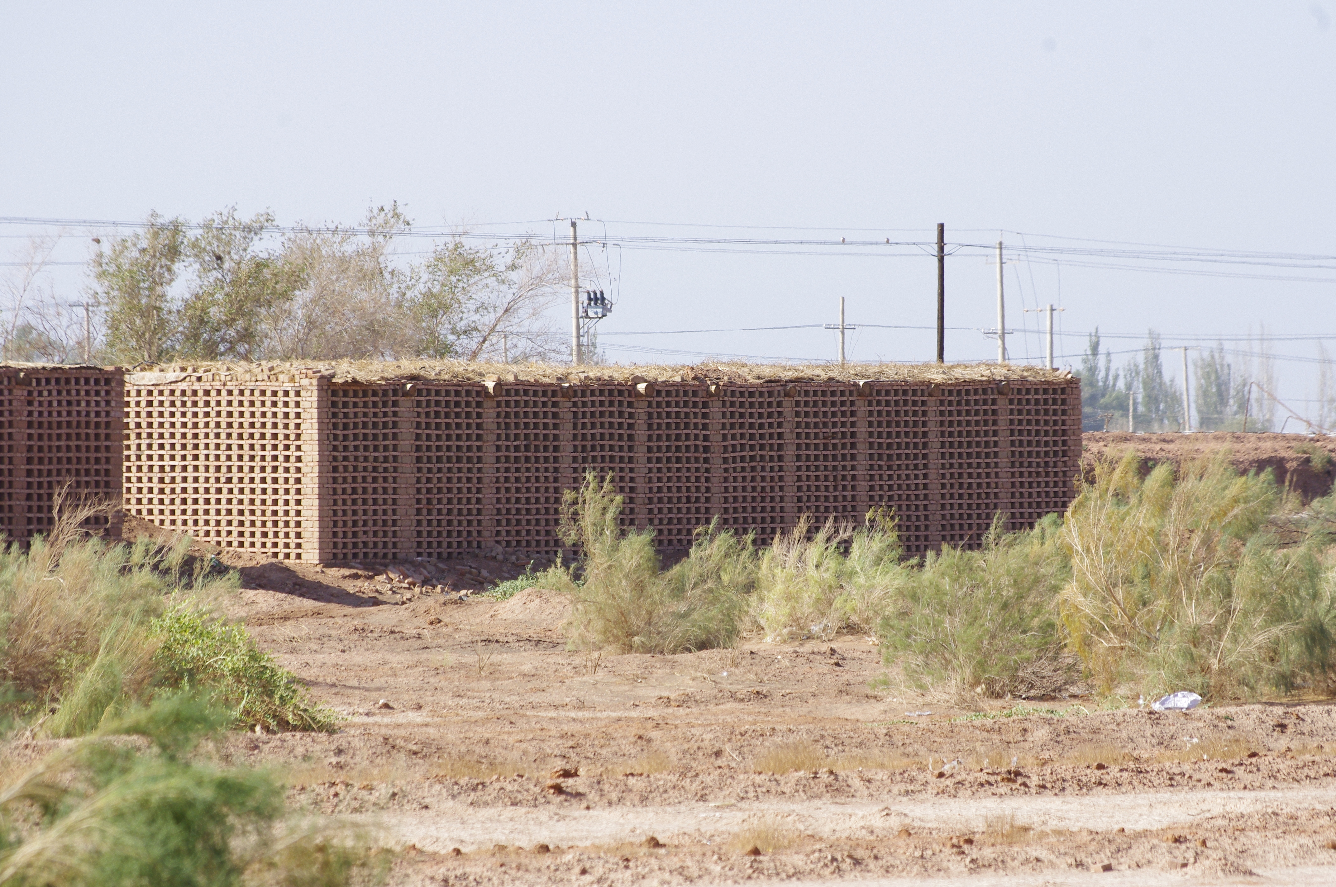 The making of this document was supported by Wikimedia Polska. To zdjęcie zostało wykonane podczas Wikiwyprawy 2015. Wszystkie zdjęcia z wyprawy możesz zobaczyć w kategorii: Wikiwyprawa 2015. English | polski | +/− To zdjęcie zostało załadowane dzięki współpracy z firmą Hyperbook. polski | +/− To zdjęcie zostało załadowane dzięki współpracy z firmą: Kopex Group. English | polski | +/−